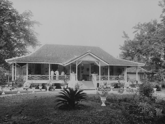 foto. Een dokter op de veranda van de dokterswoning met tuin in Soebang